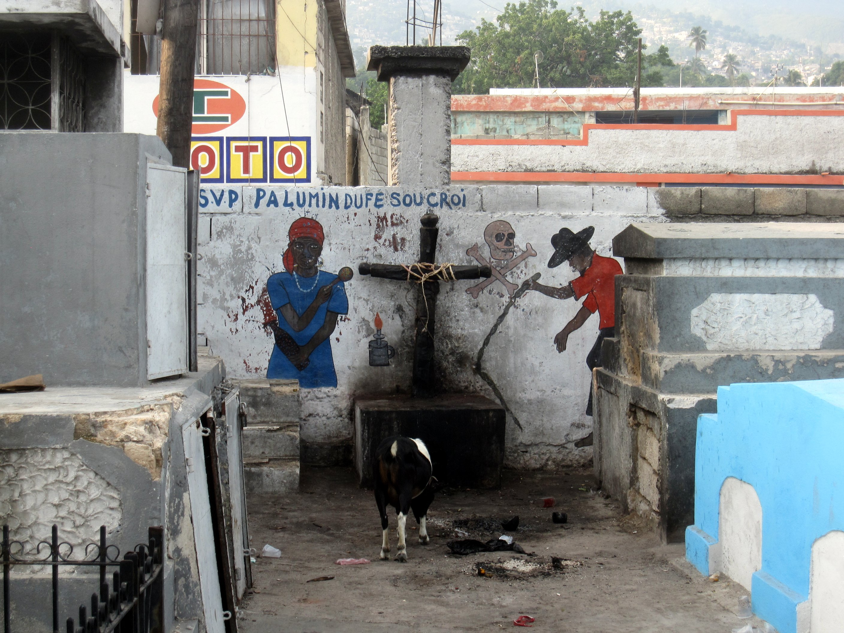 Vodou shrine